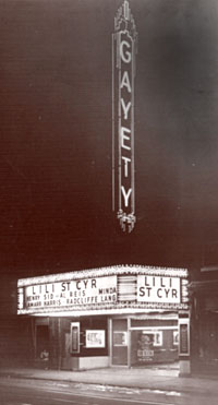 Photo d'un cabaret célèbre de Montréal : Théatre Gayety (1946)